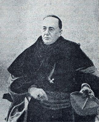 Biskup Karol Antoni Niedziałkowski